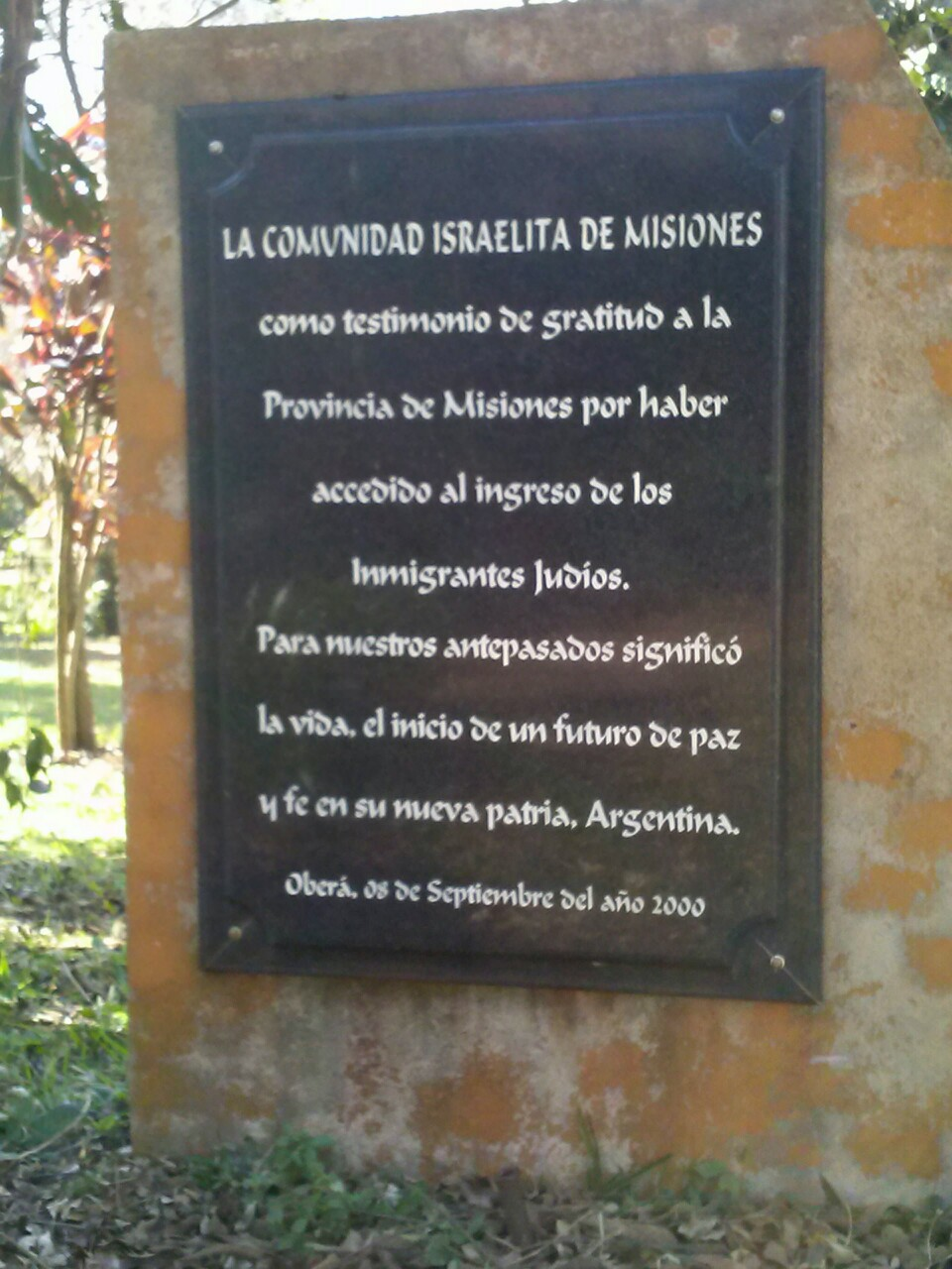 Placa conmemorativa por la inmigración judía en la provincia de Misiones, Argentina como muestra de agradecimiento al abrir sus puertas a la comunidad hebrea.